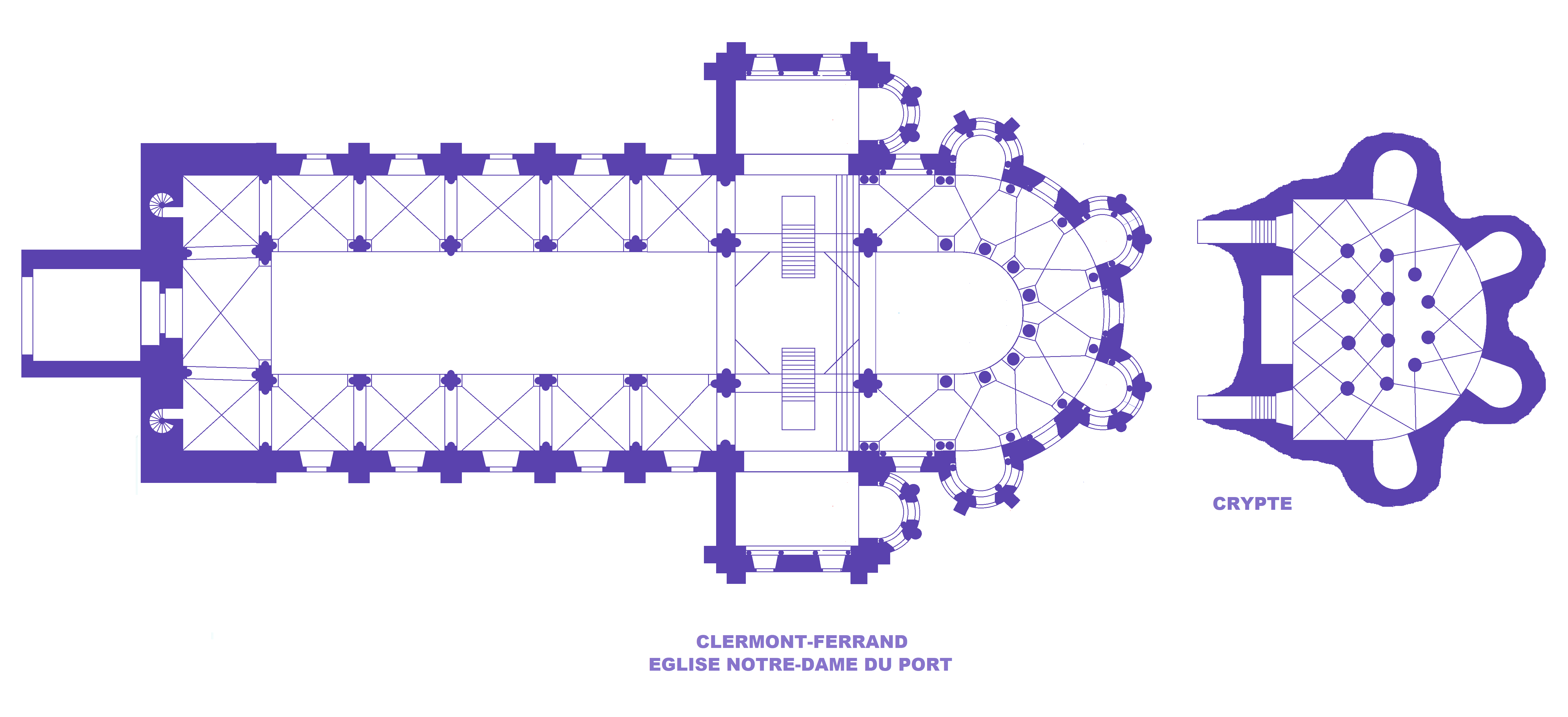 Clermont-Ferrand, église Notre-Dame du Port, Plans